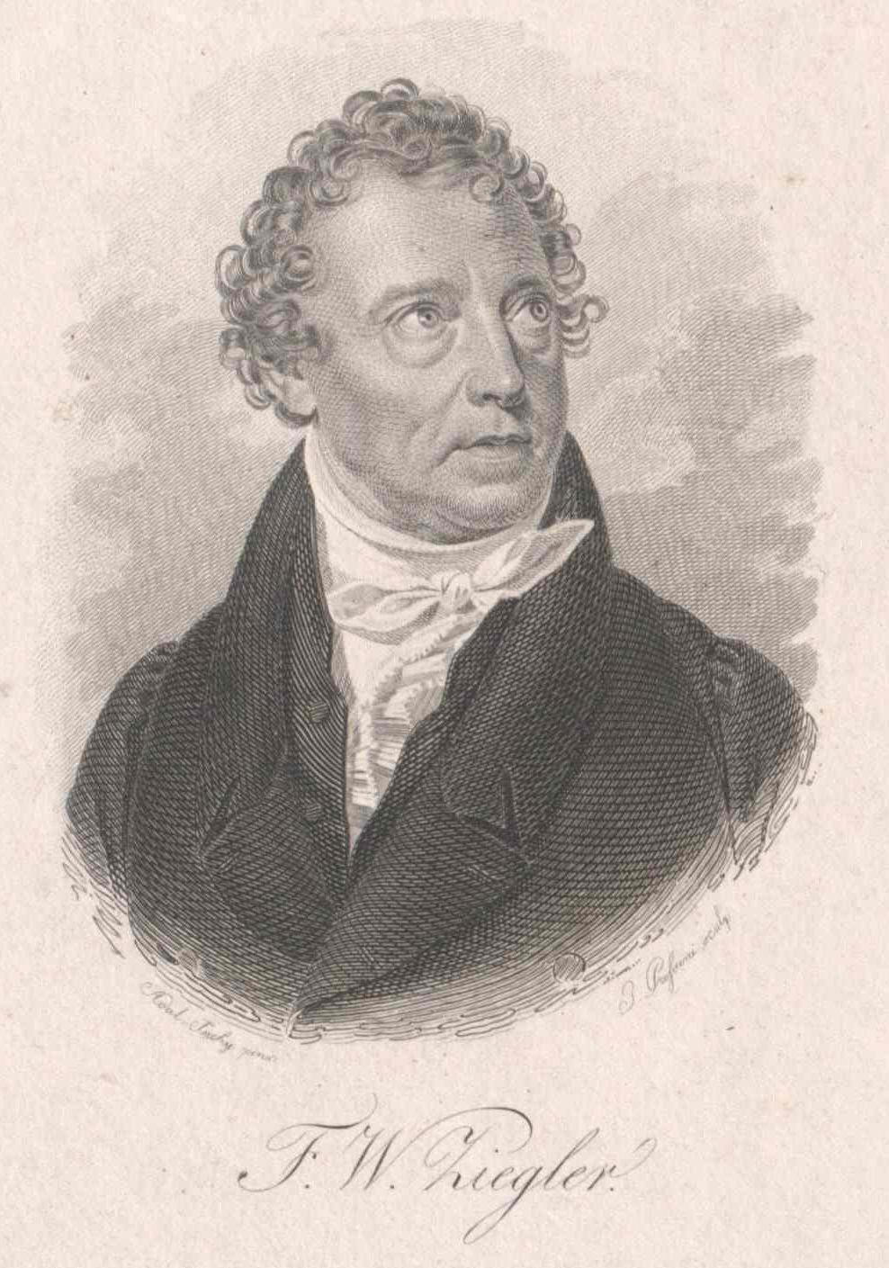 Friedrich Wilhelm Ziegler, Wien, Österreichische Nationalbibliothek, Bildarchiv und Grafiksammlung, Porträtsammlung, Inventar-Nr. PORT_00091653_02